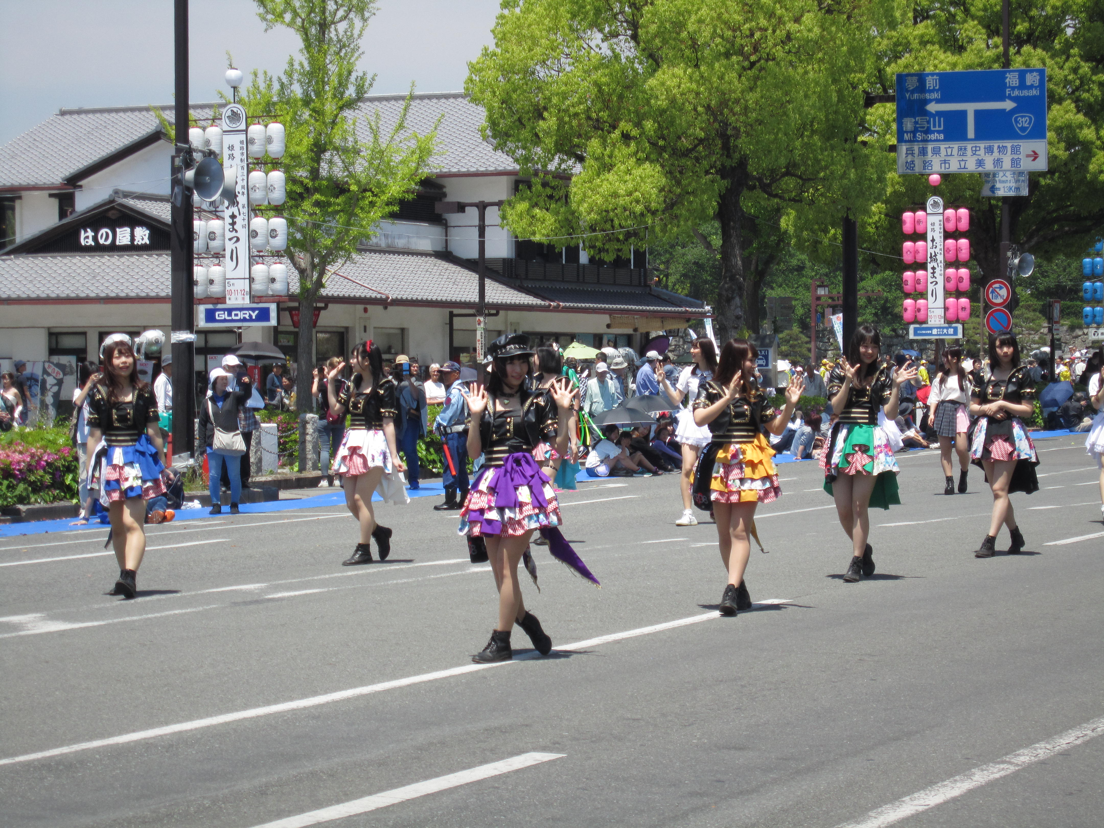 第70回姫路お城まつりに参加する姫路の女性ローカルアイドルグループ「KRD8」のメンバー。